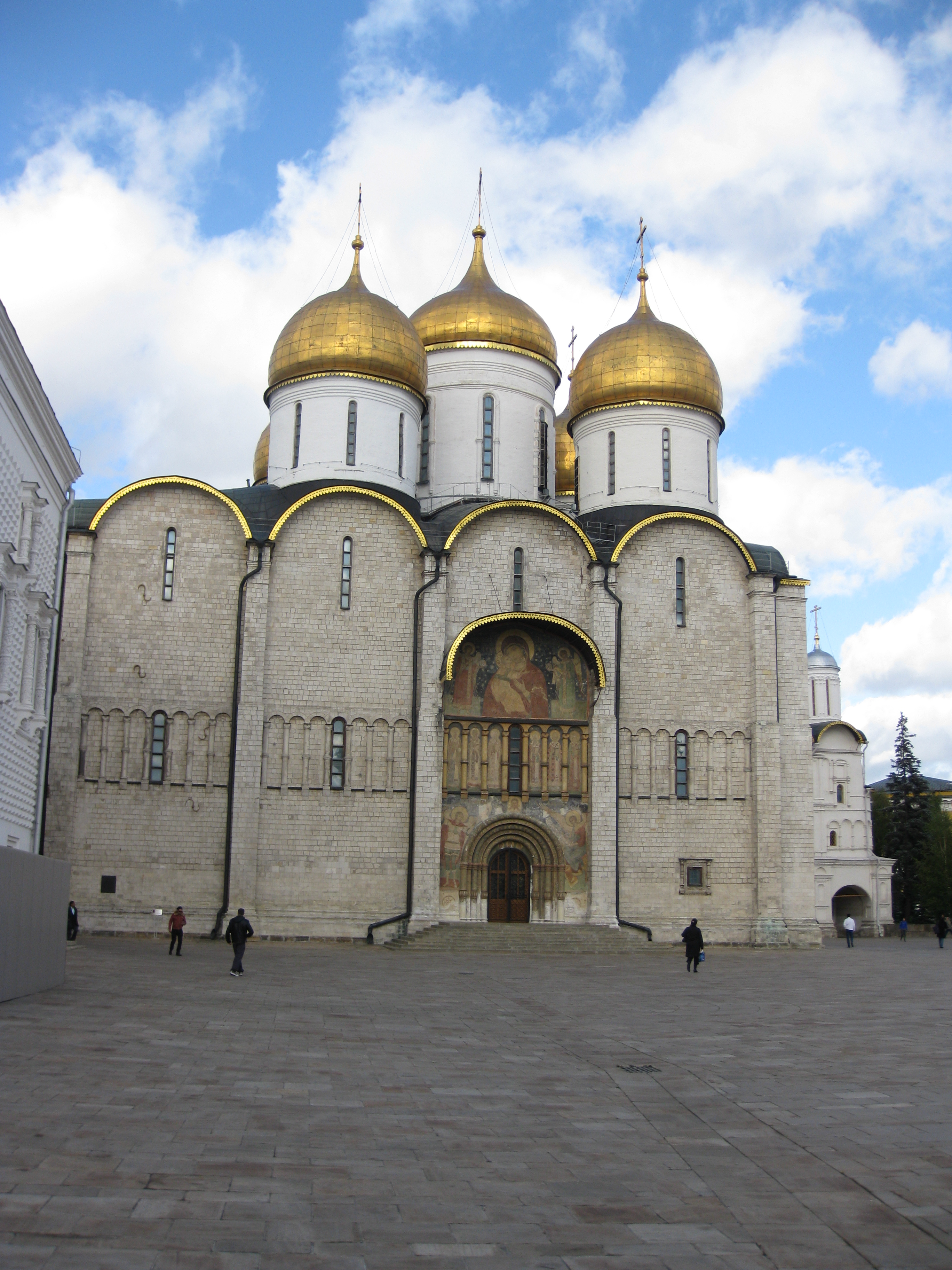 Moscow Kremlin הקרמלין